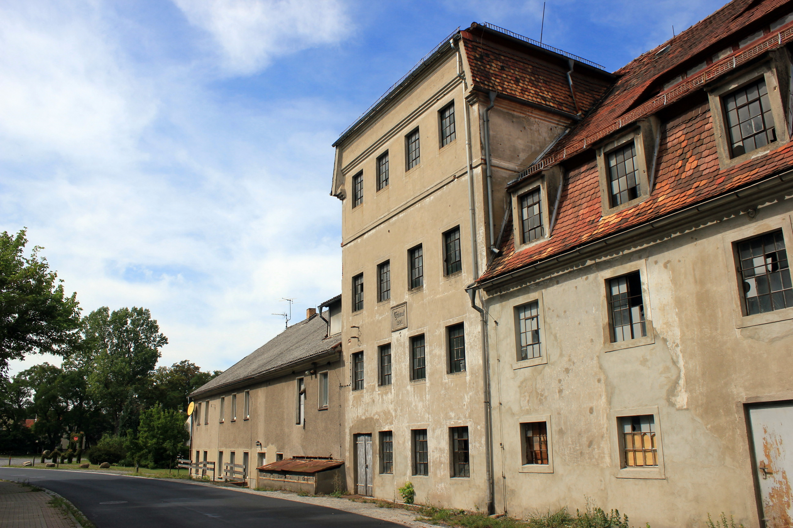 Alte Mühle in Mücka, Landkreis Görlitz, Sachsen.Hornjoserbsce: Stary młyn w Mikowje, wokrjes Zhorjelc.